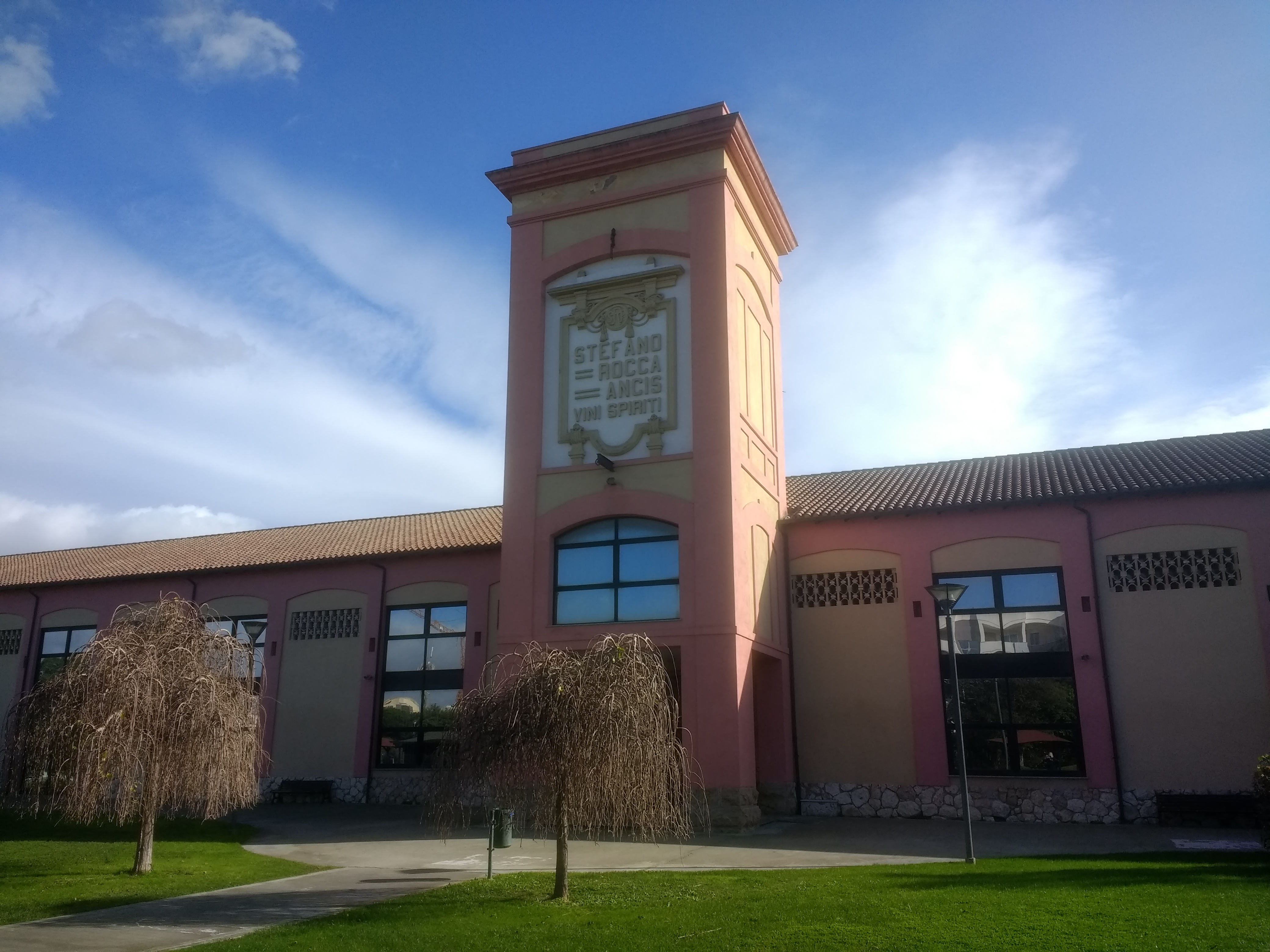 Foto scattata a Pirri nel dicembre 2019